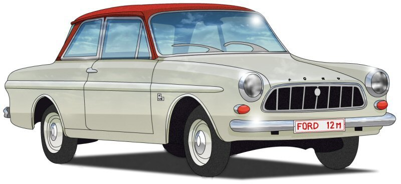 Ford Deutschland 12M, 1962